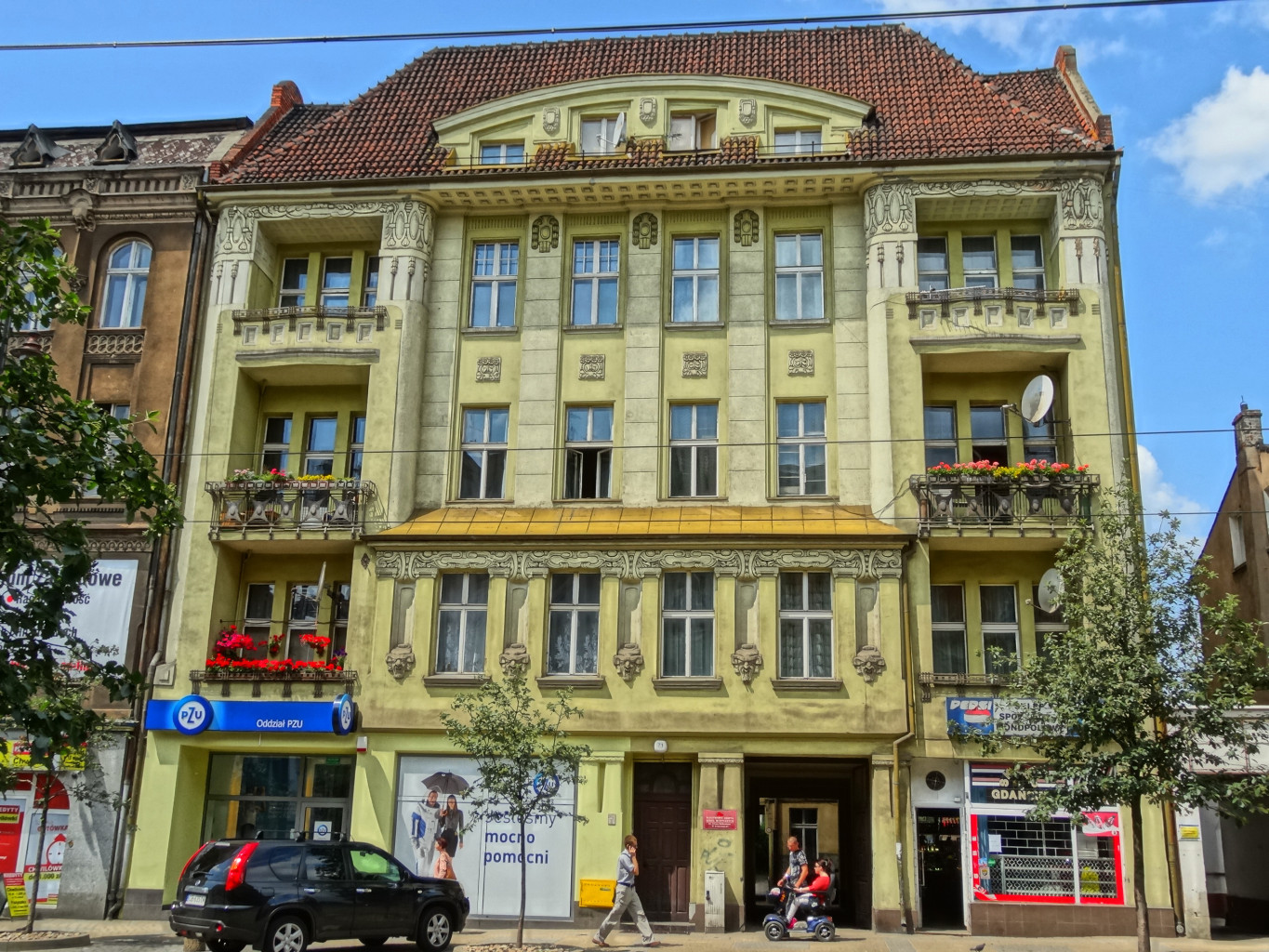 Kamienica przy ul. Gdańskiej 71 w Bydgoszczy (1906-1908)